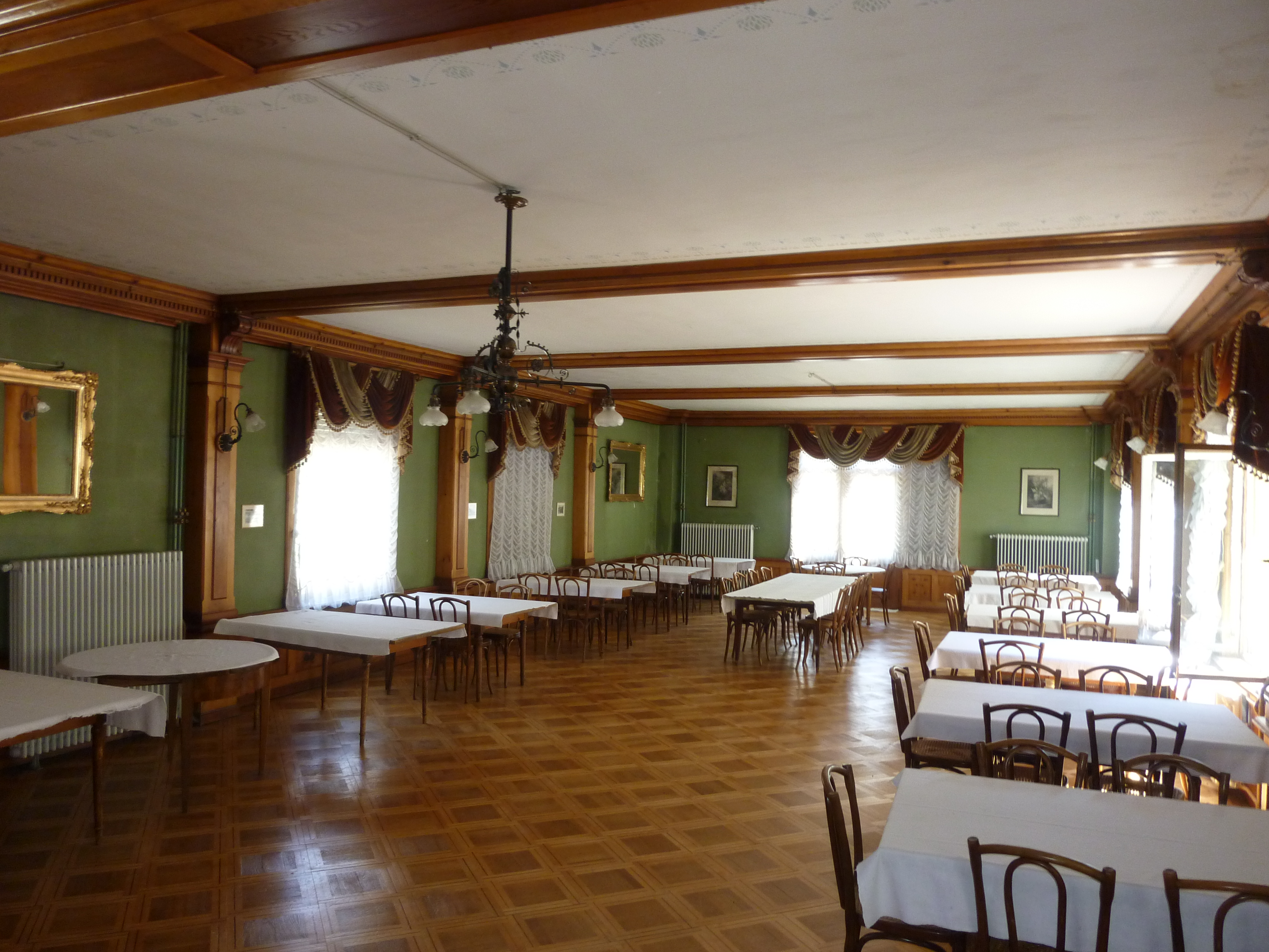 Posthotel Löwen in Mulegns GR Jugendstilsaal